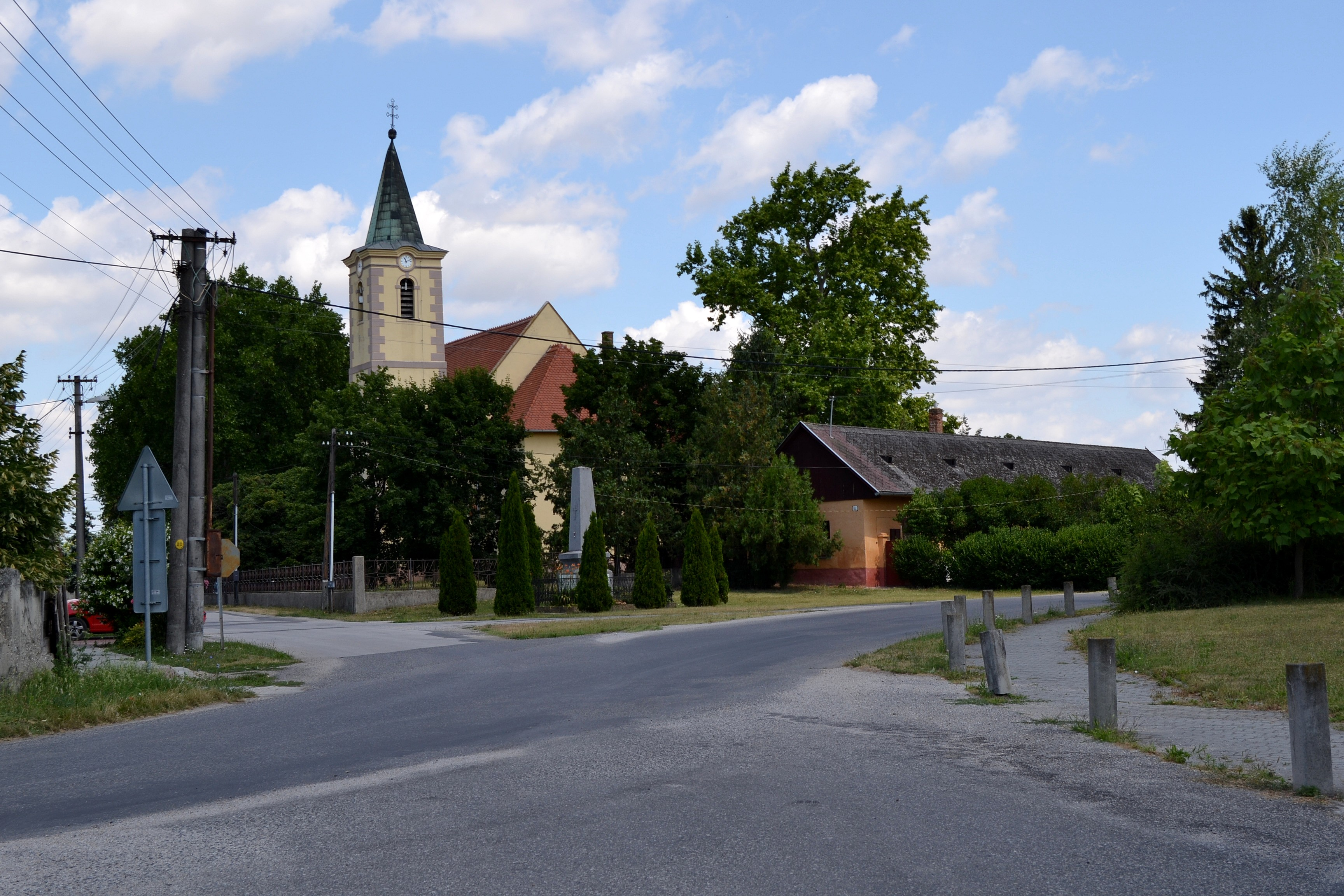 Veľká Paka (okr. Dunajská Streda), centrum obce s Kostolom svätého Ladislava